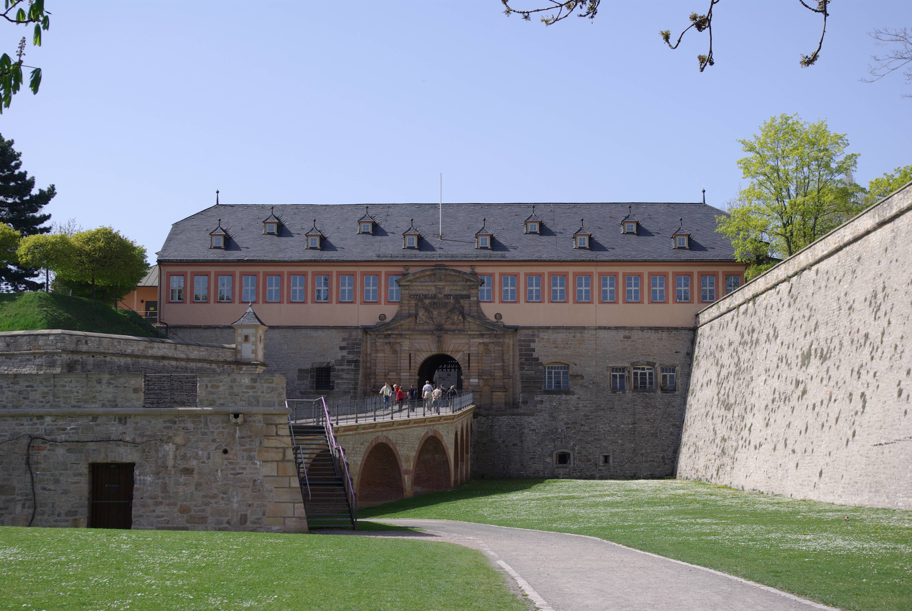 Erfurt in Thüringen. Der Eingang zur Zitadelle in Erfurt. Das Kommandantenhaus wurde zwischen 1666 und 1668 errichtet.